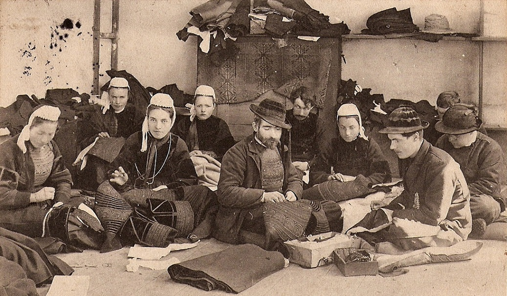 Atelier de brodeurs et de brodeuses de la maison Pichavant à Pont-l'Abbé vers 1909 (carte postale collection Villard)